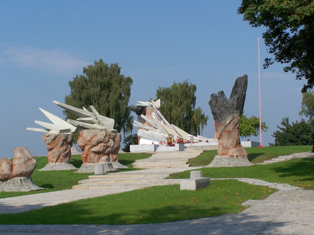 Pomnik Obrońców Białegostoku fot. Zdzisław Rapnicki